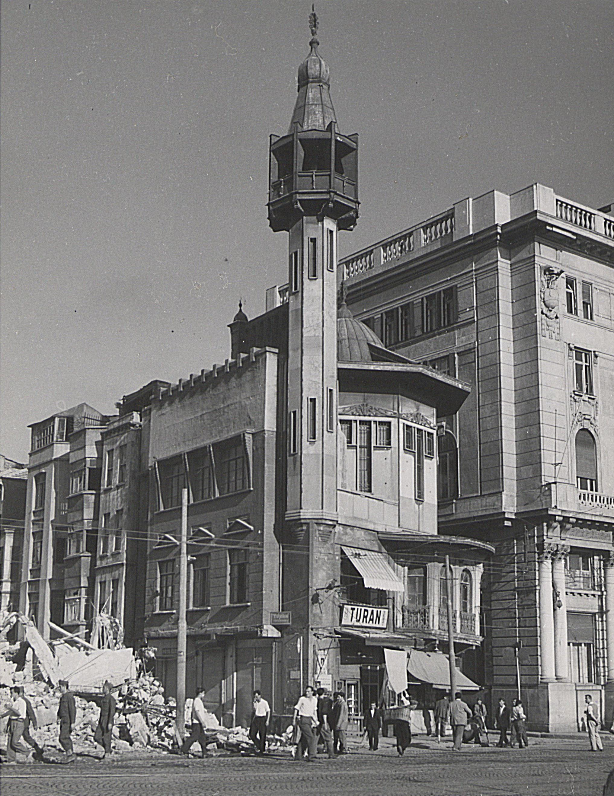 Under the leadership of Adnan Menderes, the Democrat Party introduced the law “Public Works and Confiscation” in 1956, within the scope of the İstanbul Zoning Project. This extensive zoning program was presented as a solution to the excessive traffic problem in the city, to provide public spaces around historic building, and to enable the restoration of monumental buildings. The project design included large boulevards that would pass through historical areas such as Kemeraltı Street between Karaköy and Tophane. Karaköy was transformed by the connection of its six main streets to one square, with historical buildings such as Old Borsa Inn and Merzifonlu Kara Mustafa Paşa Mosque, designed by Raimondo D’aronco, being eradicated. Ultimately the implimentation of this law led to the dereliction of more than ten thousand Buildings. SALT Research, Photography Archive and Ali Saim Ülgen Archive Adnan Menderes liderliğindeki Demokrat Parti hükümeti, 1956’da İstanbul İmar Projesi kapsamında yeni bir imar kanunu, bir süre sonra da istimlak kanunu çıkardı. Geniş kapsamlı bu imar operasyonuna gerekçe olarak, kent içi trafiğin rahatlatılması, meydan ve camilerin çevrelerinin açılması ve dinî yapıların restore edilmesi gerekliliği gösterildi. Tarihsel dokunun yoğun olduğu yerlerden geçecek geniş bulvarların öngörüldüğü proje için, aralarında tarihî eserlerin de olduğu 10 binden fazla yapı istimlak edilerek yıkıldı. Karaköy-Tophane arasında kalan Kemeraltı Caddesi ve Karaköy-Azapkapı bağlantısı bu proje kapsamında hayata geçirildi. Altı ana caddesinin bir meydana bağlanması suretiyle dönüştürülen Karaköy’de, Eski Borsa Hanı ve Raimondo D’aronco tarafından tasarlanmış olan Merzifonlu Kara Mustafa Paşa Camii başta olmak üzere birçok tarihi yapı yok edildi. SALT Araştırma, Fotoğraf Arşivi ve Ali Saim Ülgen Arşivi